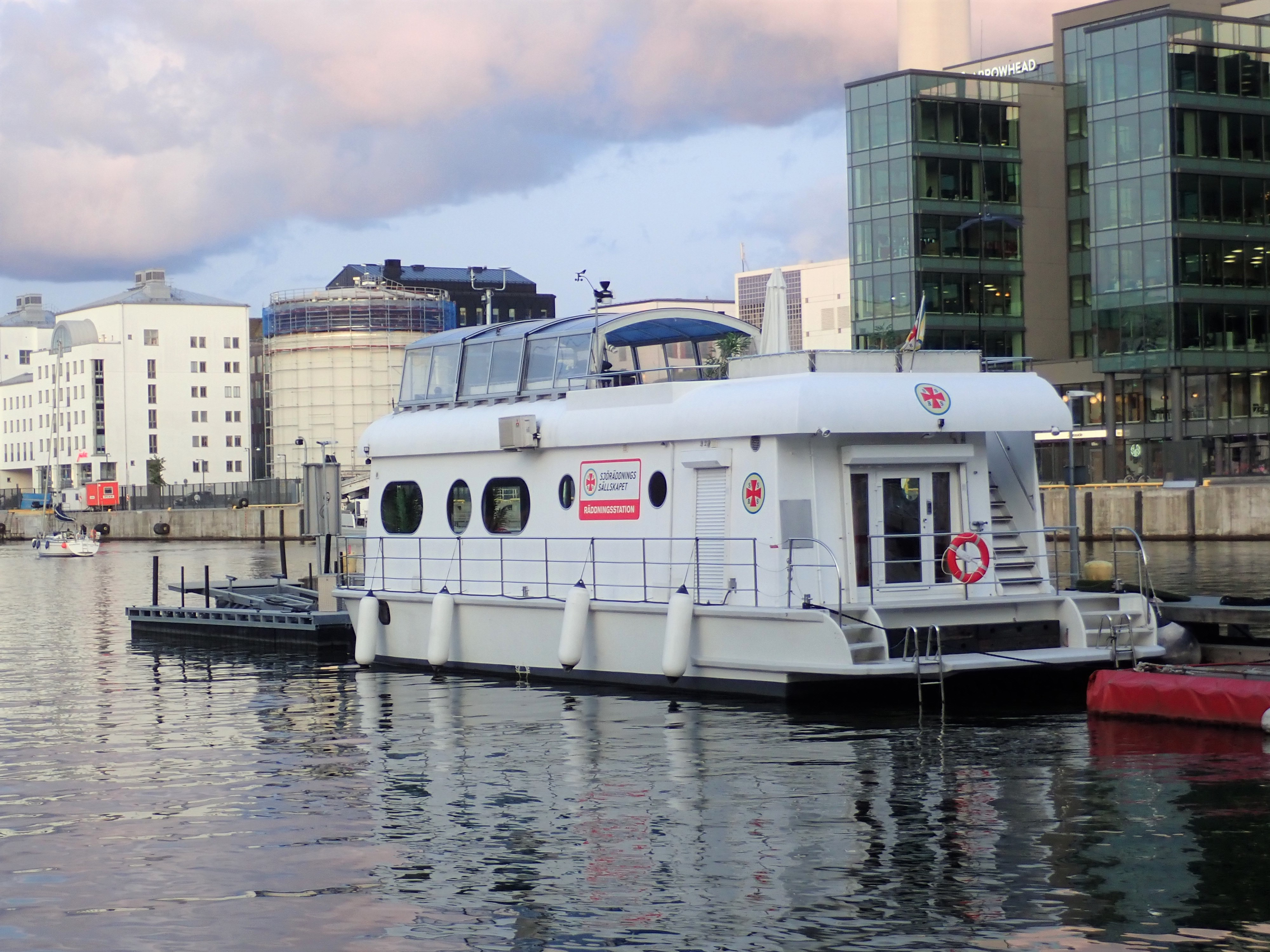 Räddningsstation Stockholms flytande stationshus, den 21 augusti 2019